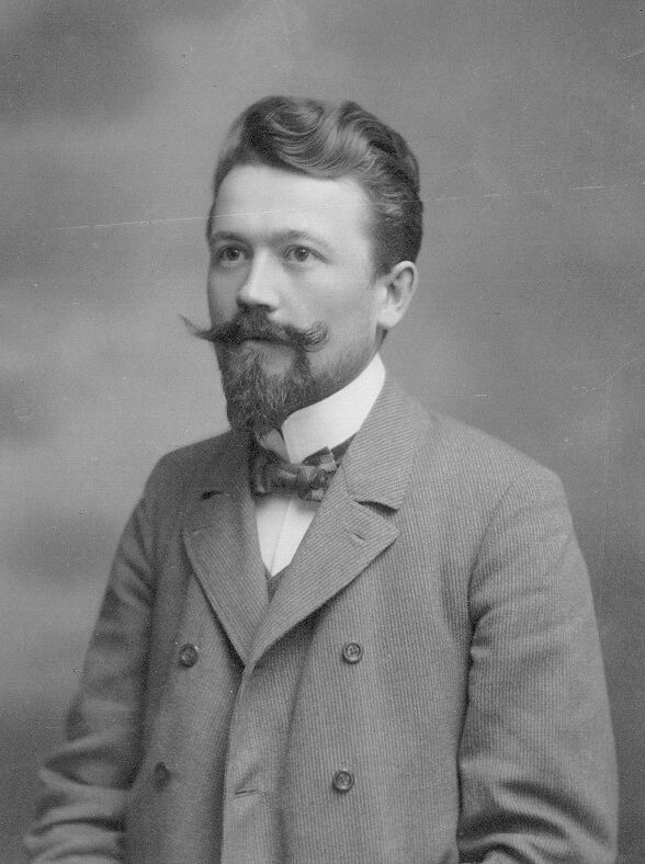 František X. Bašík, říjen 1904